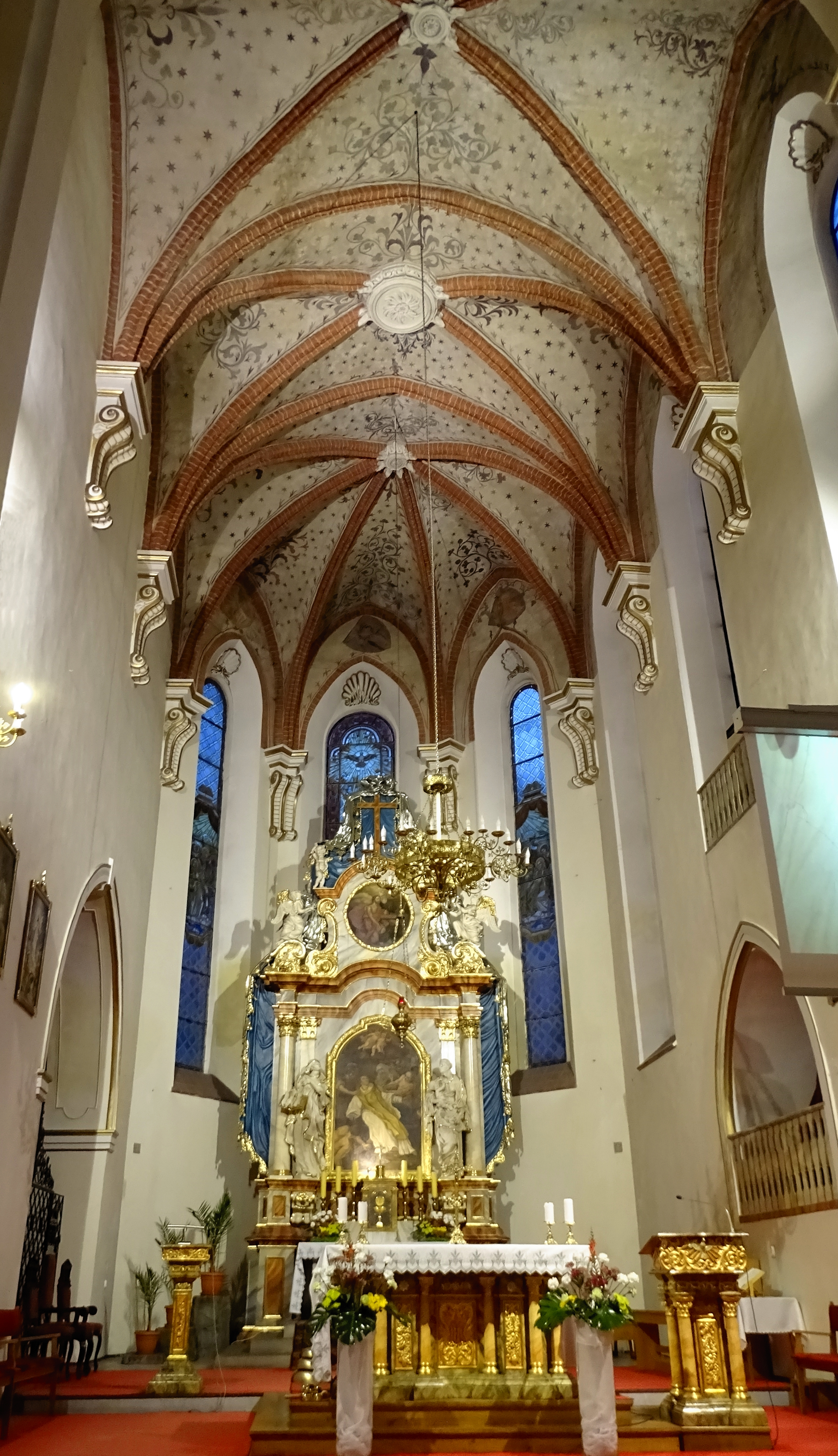 Jak w tytule